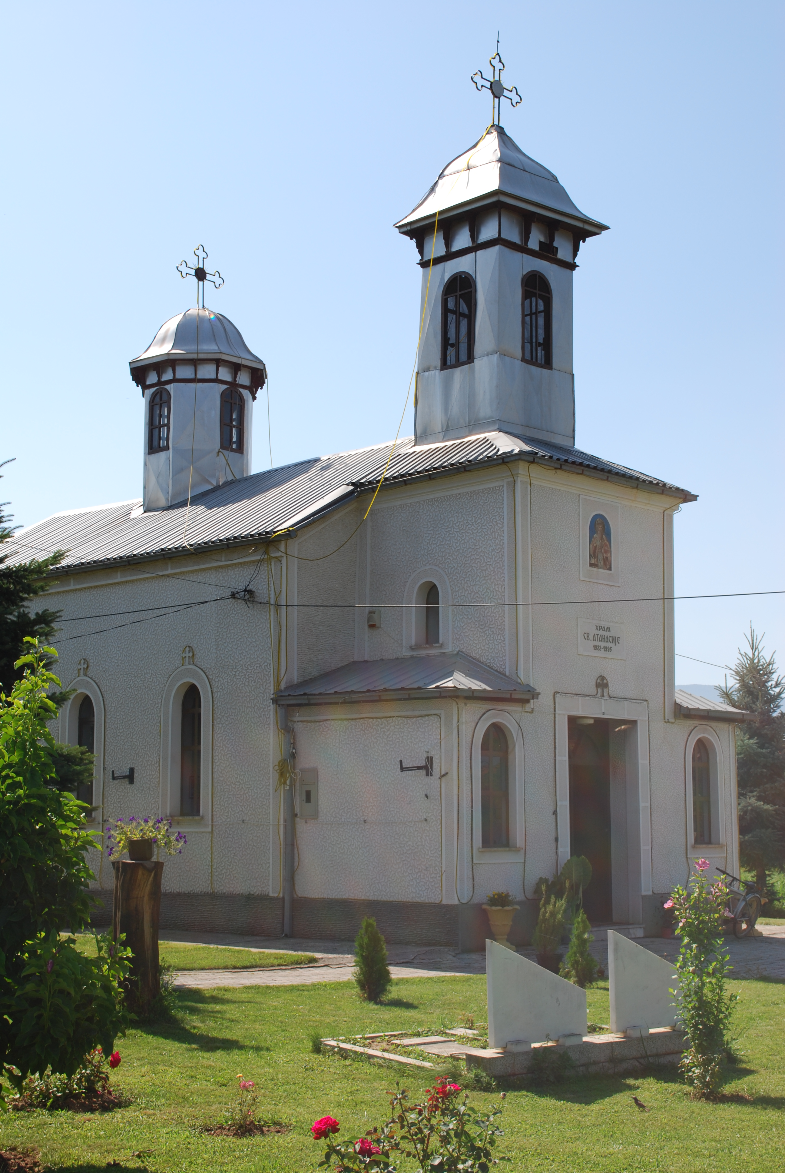 Црквата „Св. Атанасиј“ во Брвеница, Тетово, Македонија